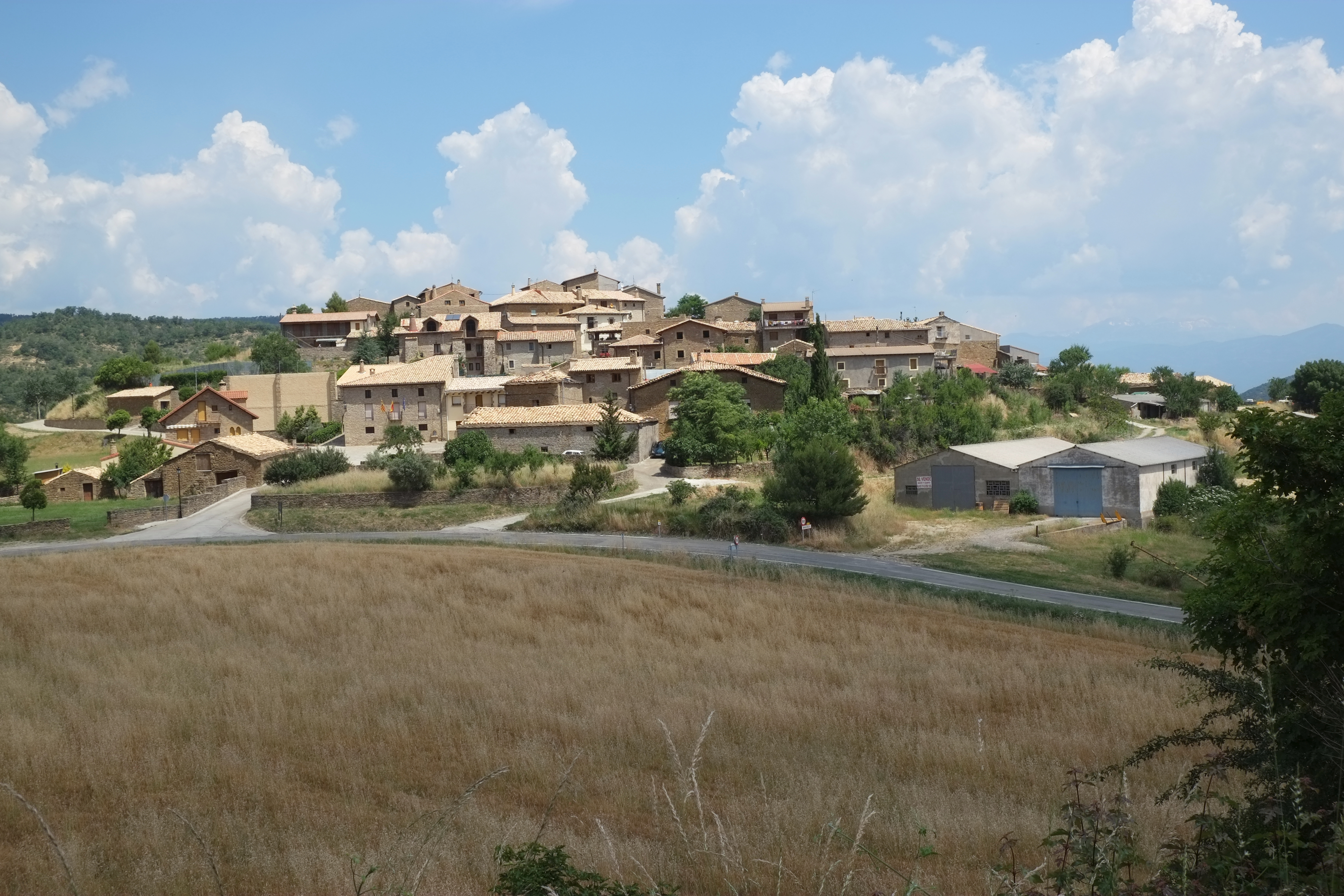 Bagüés in der spanischen Provinz Saragossa (Aragonien/Spanien)